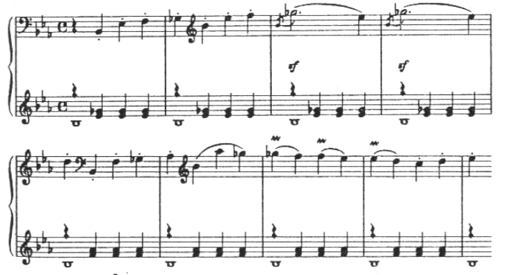 Патетичная соната побочная партия